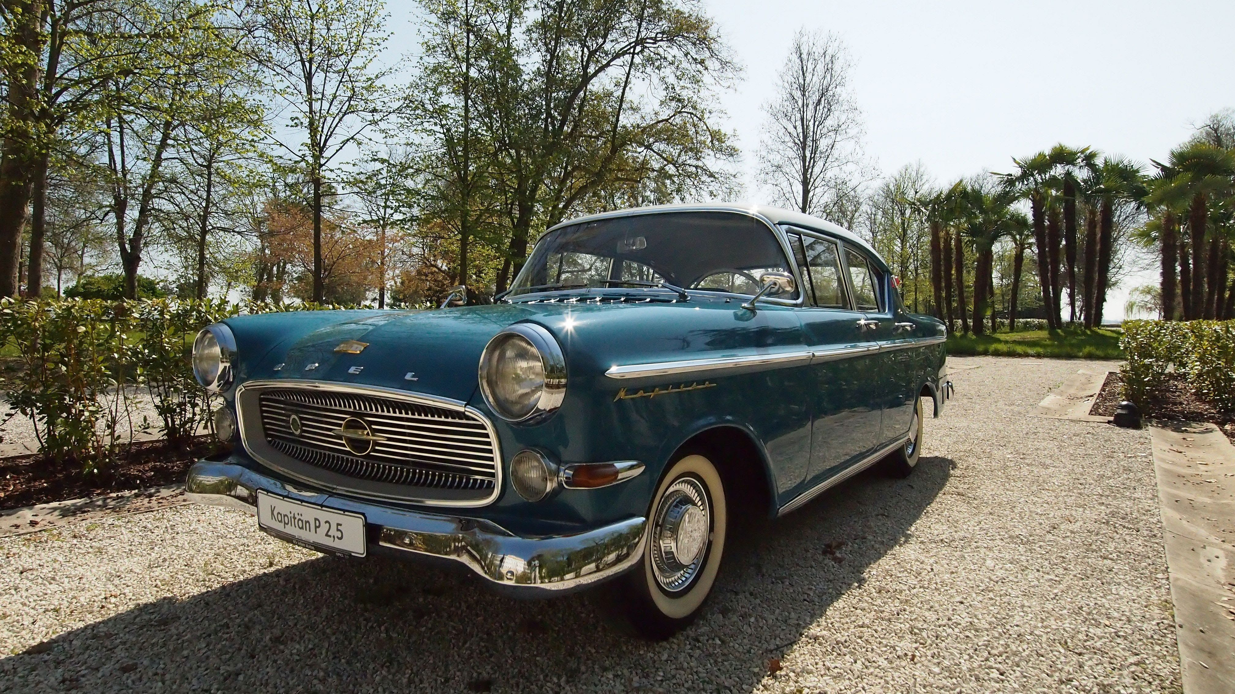 Opel Kapitän P 2,5, märts 2017, Veneetsia